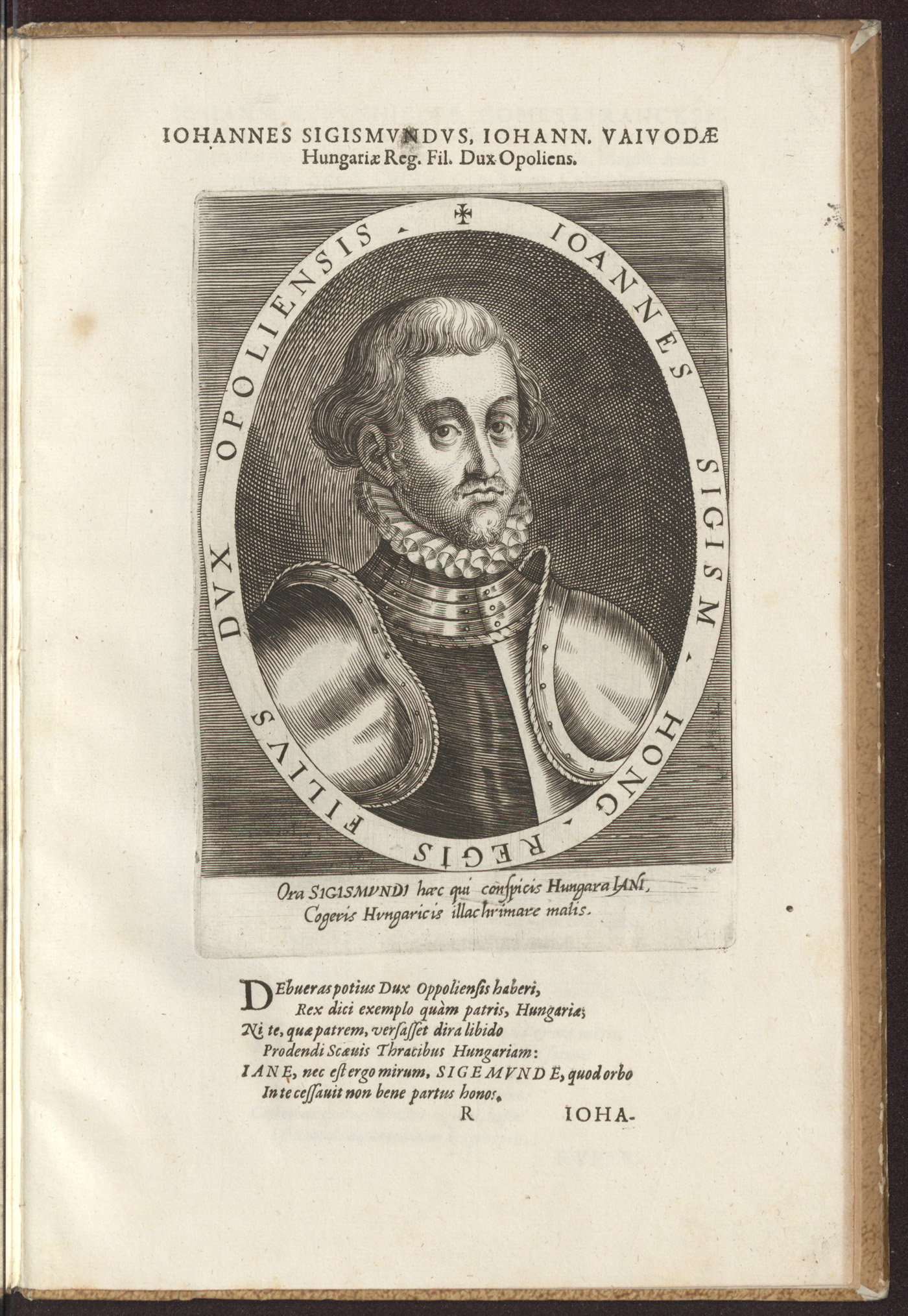 Johannes Sigismund Zapolya